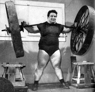 Paul Anderson durante un esercizio di squat con..... una ruota di carro